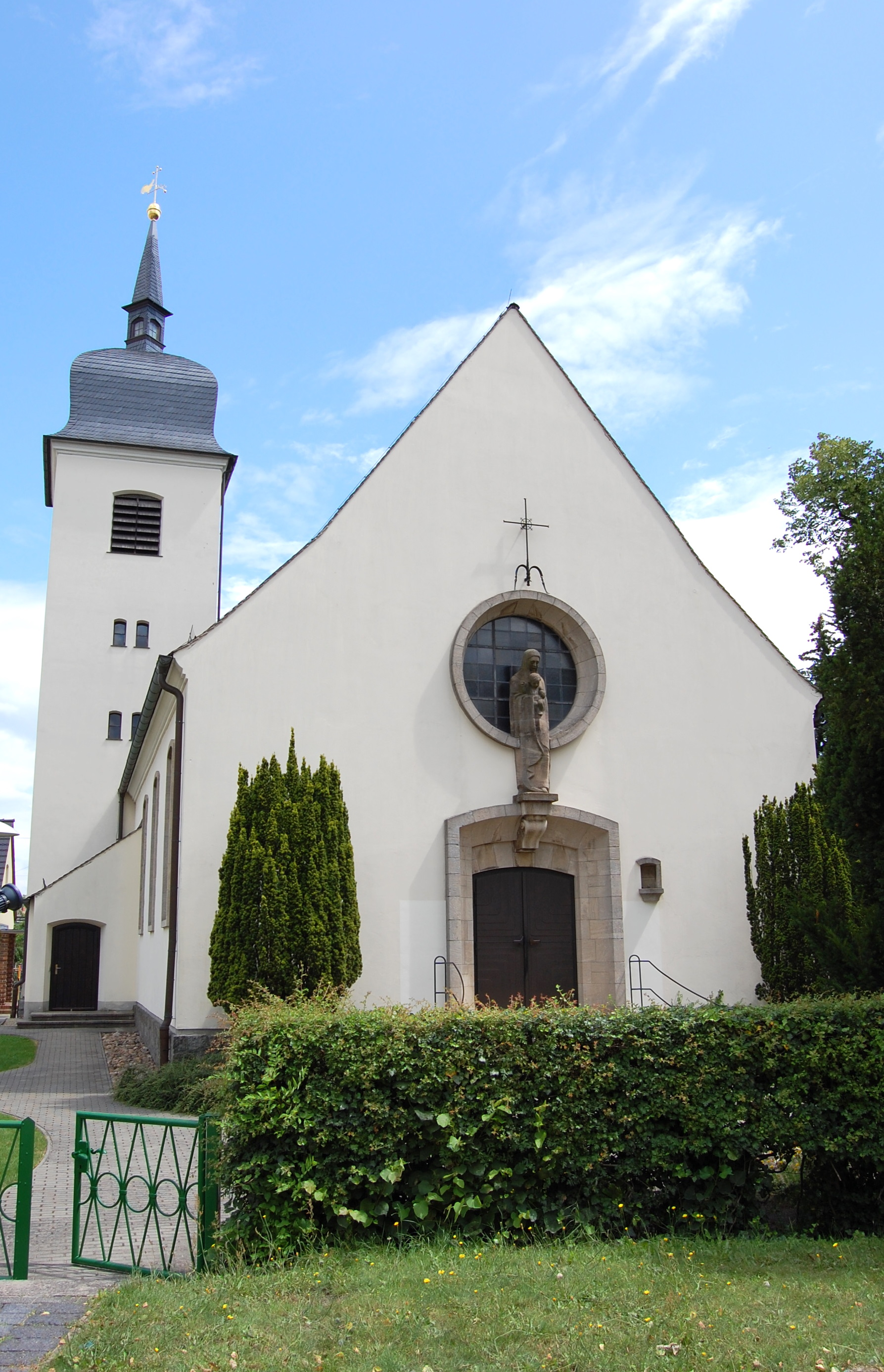 Sankt-Maria-Verkündigung Lübbenau, kath. Kirche